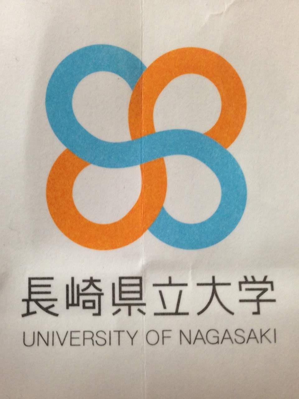 長崎県立大学学章